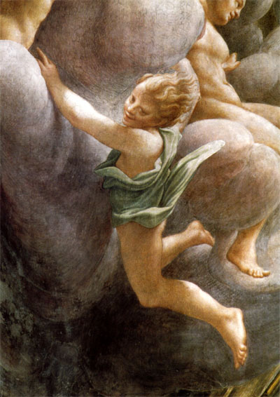 Correggio, duomo di parma, dettaglio 1